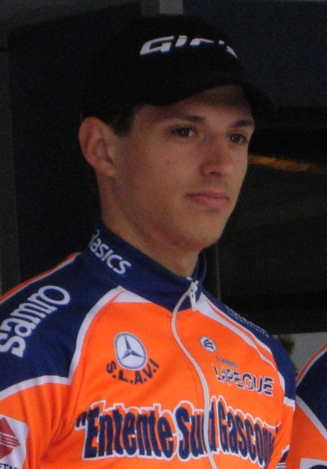 Tour de Bretagne 2013 - Présentation des équipes au départ de la deuxième étape à Ploemel - Équipe Entente Sud Gascogne Depicted person: Yoän Vérardo